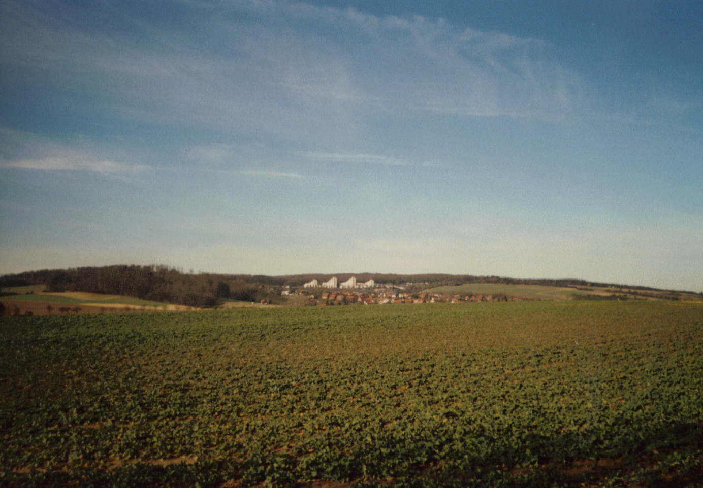 Blick zum Hildesheimer Ortsteil Neuhof mit den Hochhäusern des Wohngebiets "Trockener Kamp".